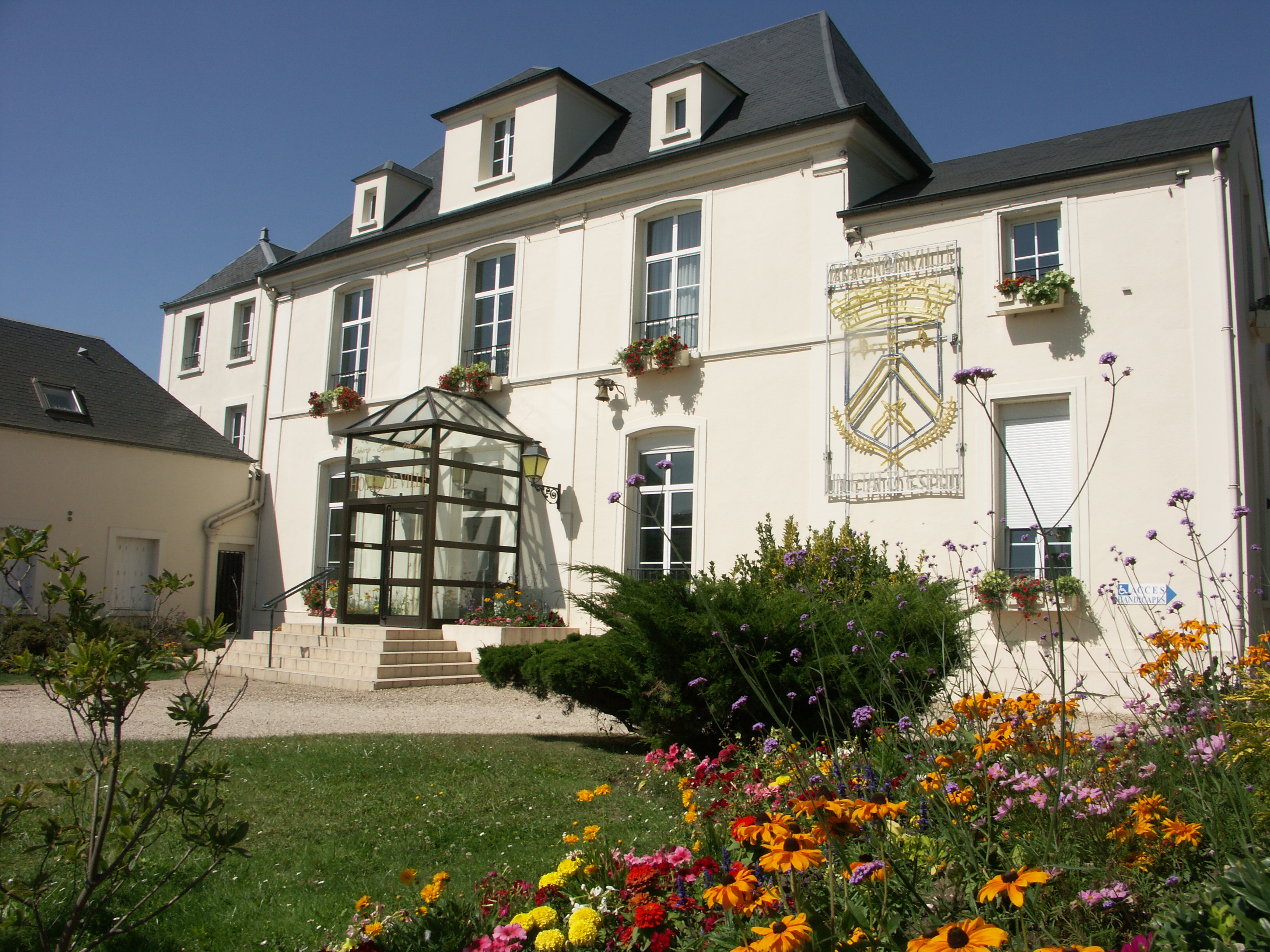 Mairie de Magnanville